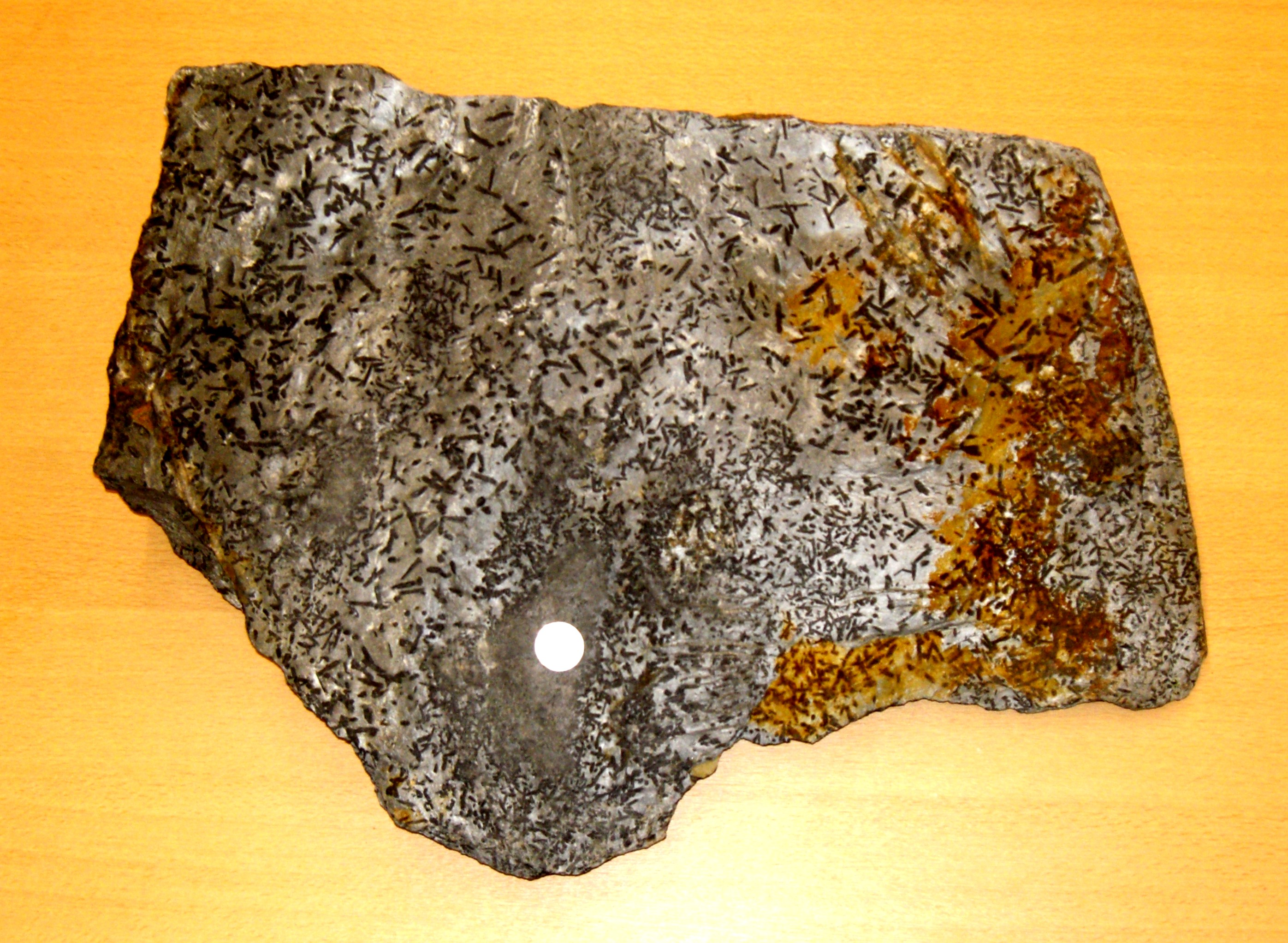 Fruchtschiefer aus Theuma, Vogtland. Handstück: 60 mal 30 cm. Münze: 1 Euro. Charakteristisch sind die Cordierit-Porphyroblasten ("Früchte"), die infolge der Kontaktmetamorphose gewachsen sind. Fotografie: Chadmull, 05.02.2006. Frei für alle Verwendungszwecke.